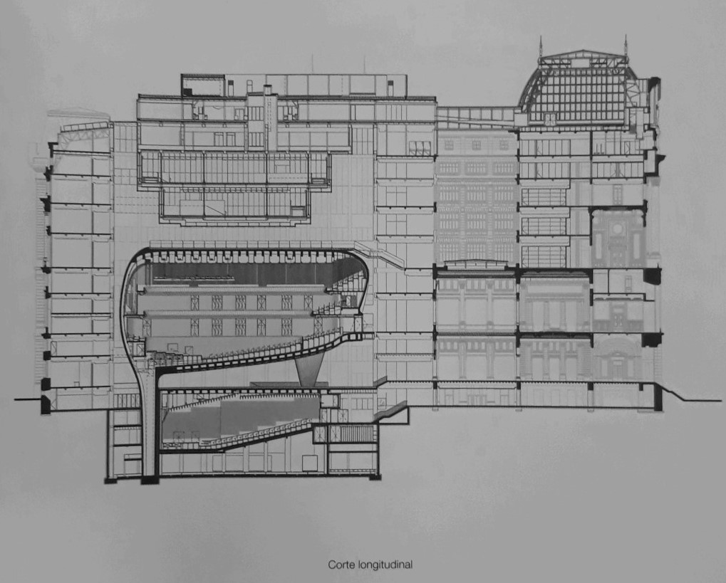 Palacio de Correos, centro cultural del Bicentenario